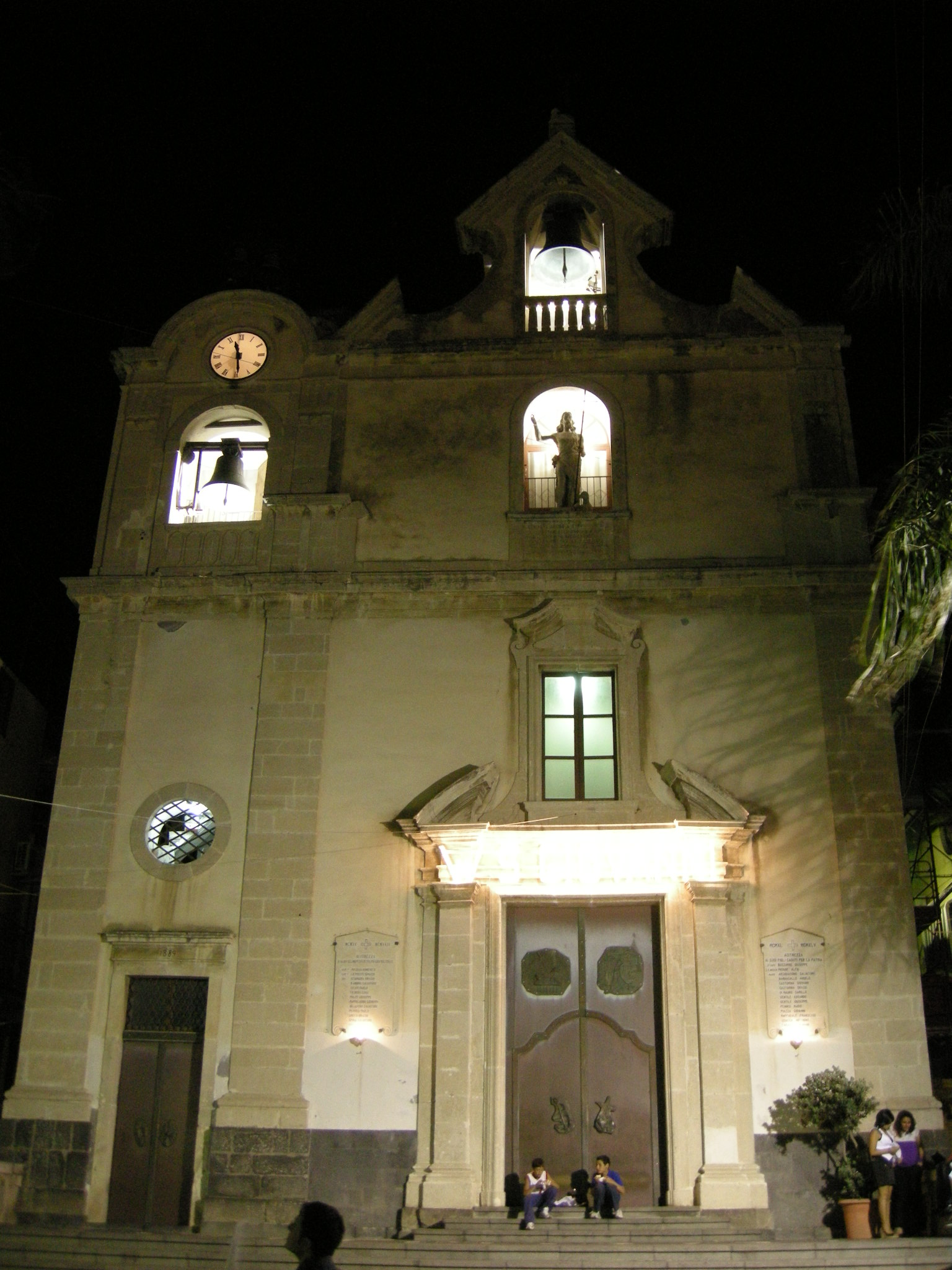 Acitrezza, san giovanni